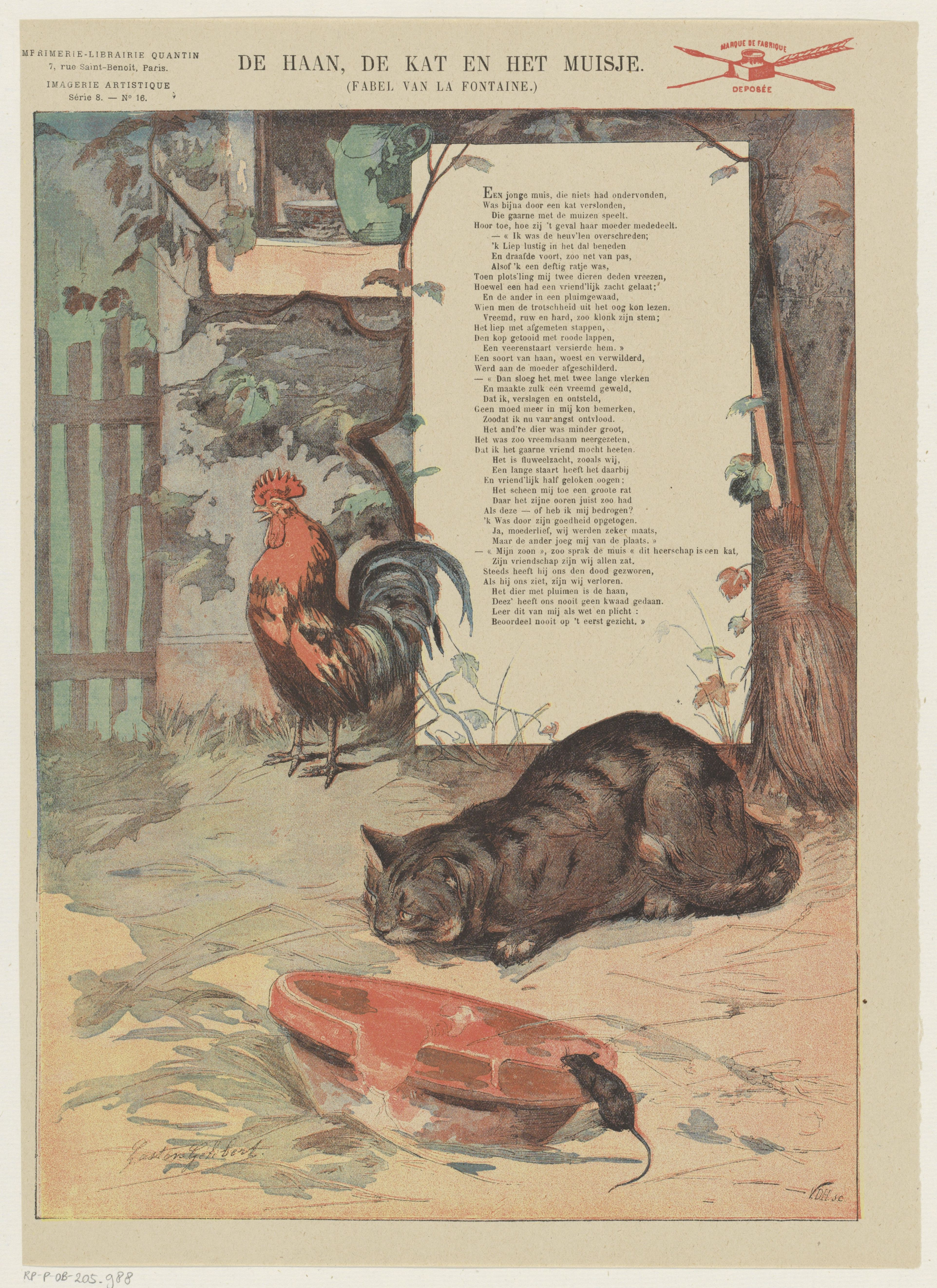 IdentificatieTitel(s): De haan, de kat en het muisje (titel op object)Fabel van La Fontaine (serietitel op object)Imagerie Artistique / Série 8 (serietitel op object)Objecttype: prent volksprent Serienummer: 16/20Objectnummer: RP-P-OB-205.988Opschriften / Merken: verzamelaarsmerk, verso, gestempeld: Lugt 2760octrooivermelding, recto rechtsboven, gestempeld: ‘marque de fabrique / deposée’, rode stempel met inktpot, pen en schrijfveerOmschrijving: Blad met een grote voorstelling uit de fabel van Jean de La Fontaine, van de haan, de kat en het muisje. Rechtsboven een tekstblok met een vers. Genummerd linksboven: Série 8. - No. 16.VervaardigingVervaardiger: prentmaker: Monogrammist VDH (vermeld op object)ontwerper: Gaston Gélibert (vermeld op object)uitgever: Albert Quantin (vermeld op object)Plaats vervaardiging: ParijsDatering: 1876 - 1890 en/of 1890Fysieke kenmerken: kleurenlithografie en tekst in boekdrukMateriaal: papier Techniek: kleurenlithografie (procedé) / boekdrukAfmetingen: blad: h 368 mm × b 266 mmOnderwerpWat: fabelsfowl (cock, hen, chicken, etc.)catrodents: mouseVerwerving en rechtenCredit line: Schenking van de heer F.G. Waller, AmsterdamVerwerving: schenking 1923Copyright: Publiek domein